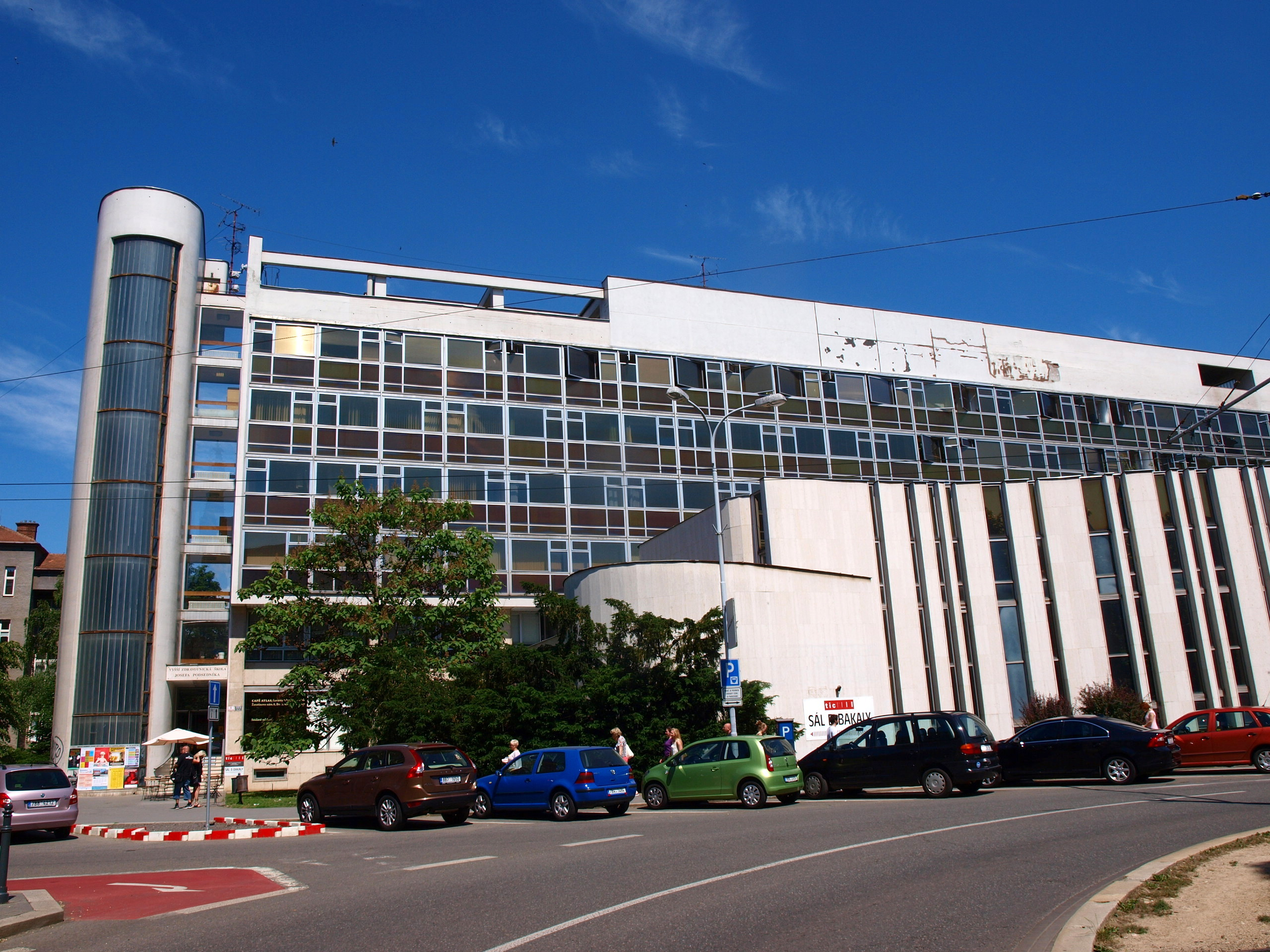 Bílý dům v Brně